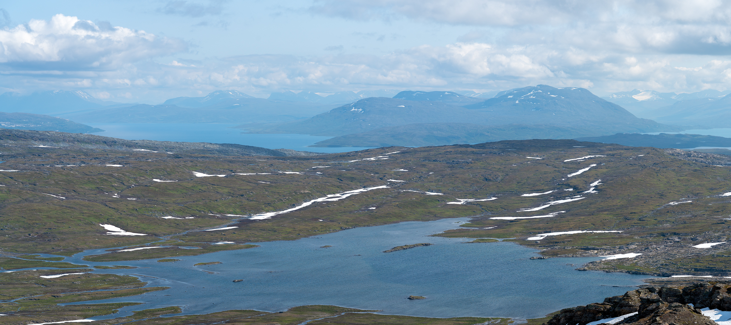 Ráhkojávrre med Vastenjaure i bakgrunden. Vy mot öster.